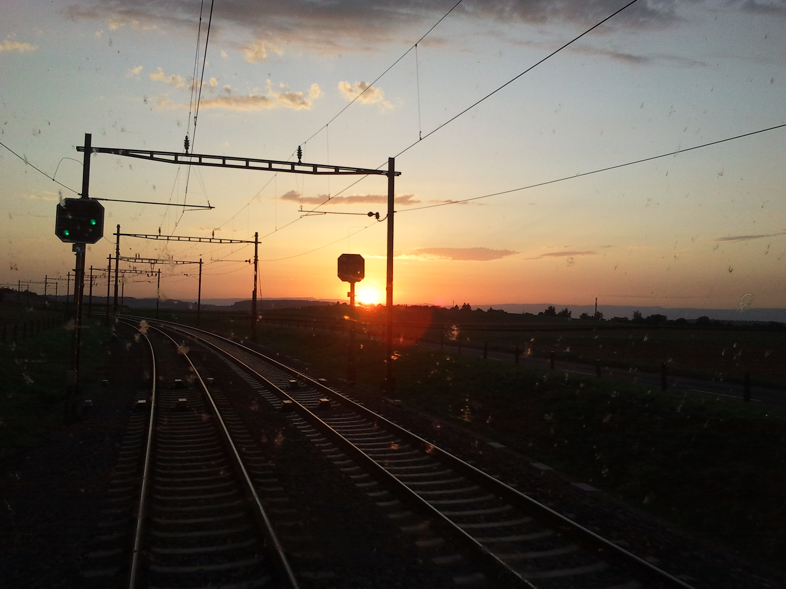 Signal avancé suisse de type L, entre Berne et Fribourg sur une portion de ligne équipée pour l'utilisation en voie unique. Au sol on voit les aimants d'Integra-Signum.